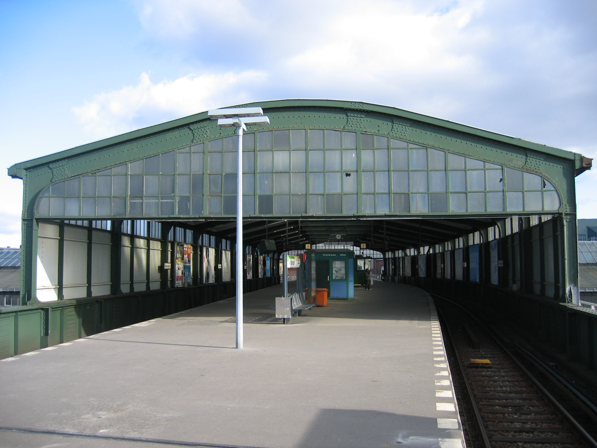 U-Bahnhof Gleisdreieck in Berlin, Bahnsteig der U1